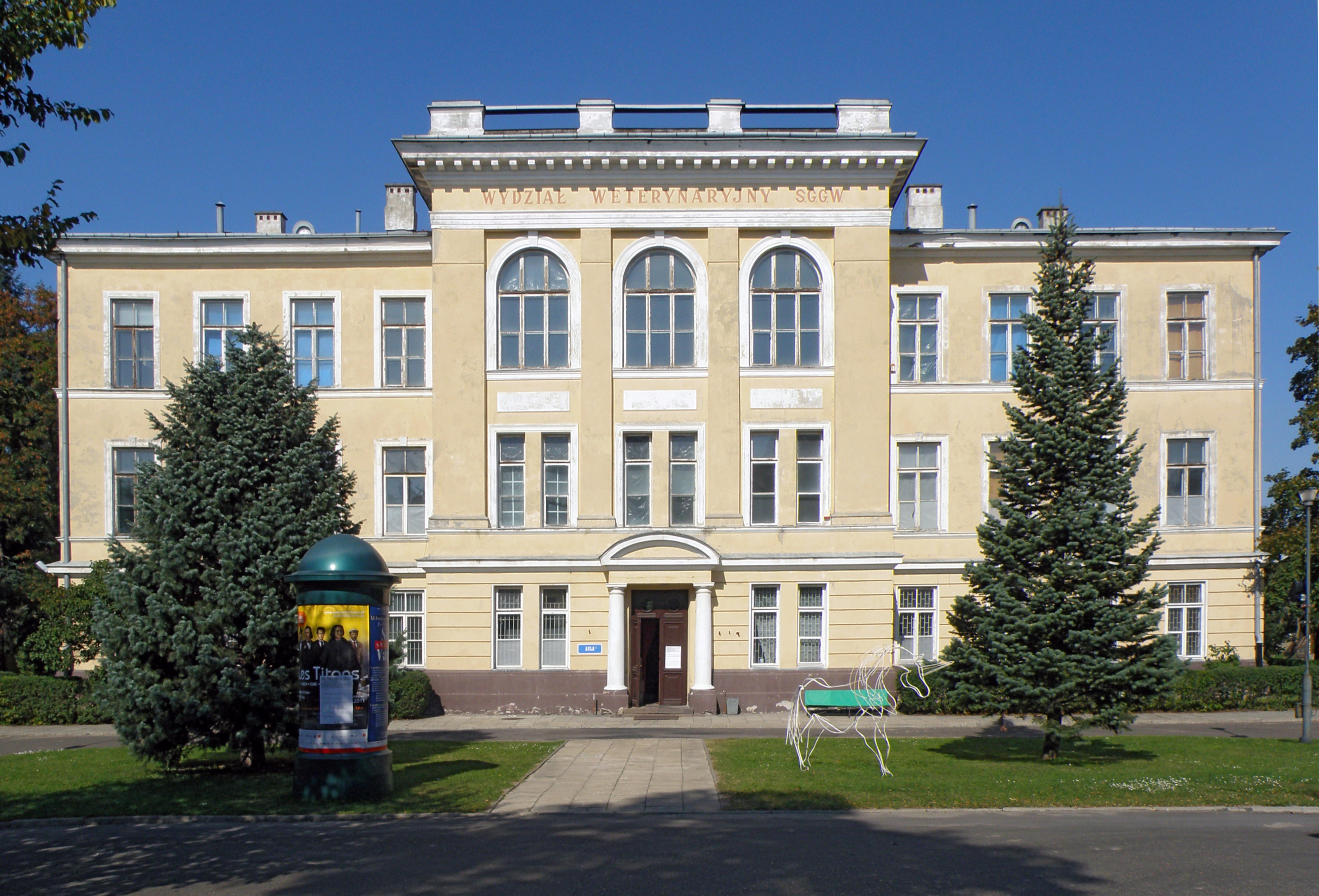 Instytut Weterynarii (1898-1900) – budynek główny (A-789 z 22.01.2008) ul. Grochowska 272, Warszawa.